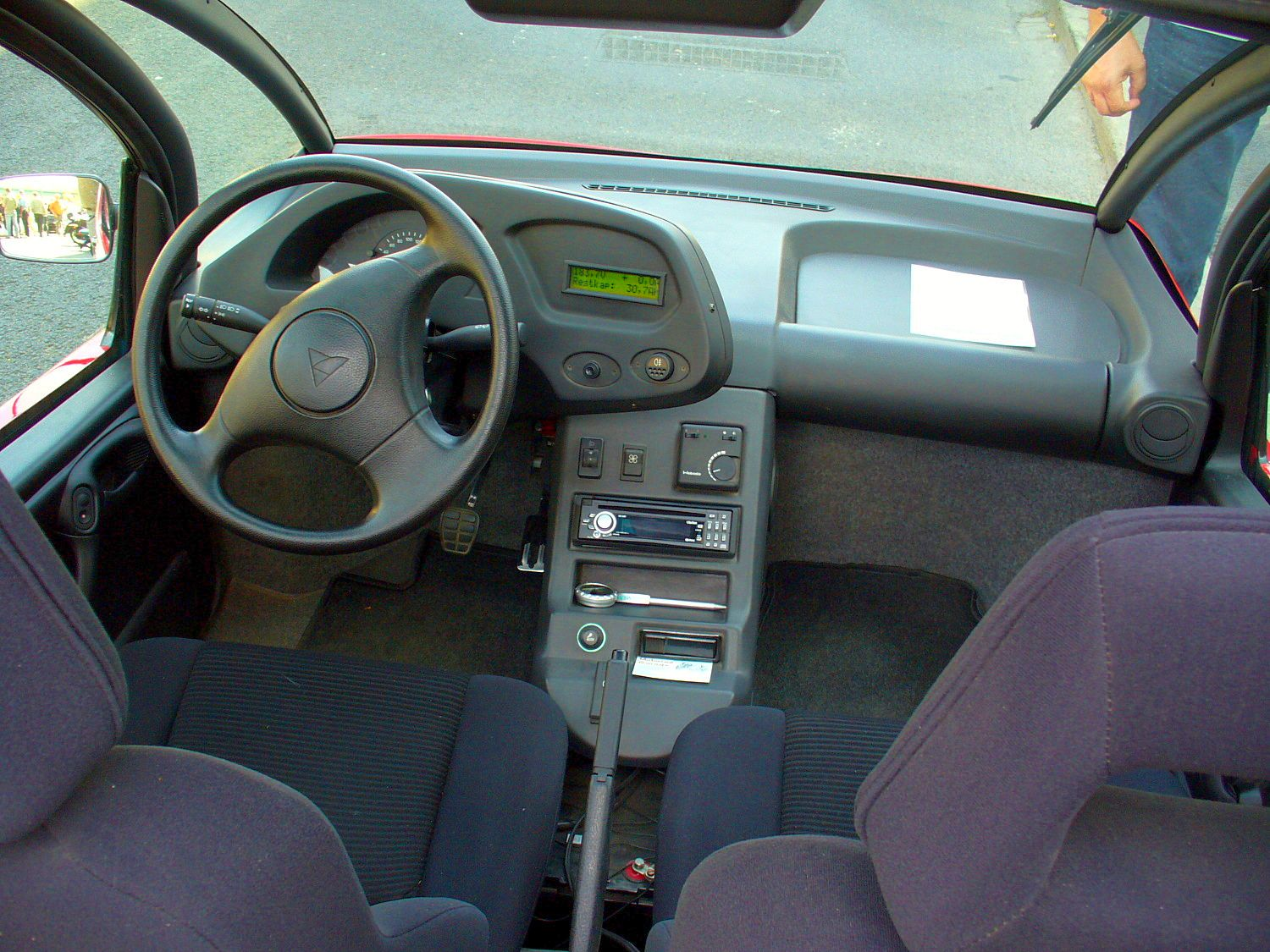 Elektroautomobil Hotzenblitz, gebaut 1993-1996: Innenraum GFK-Version mit Türen